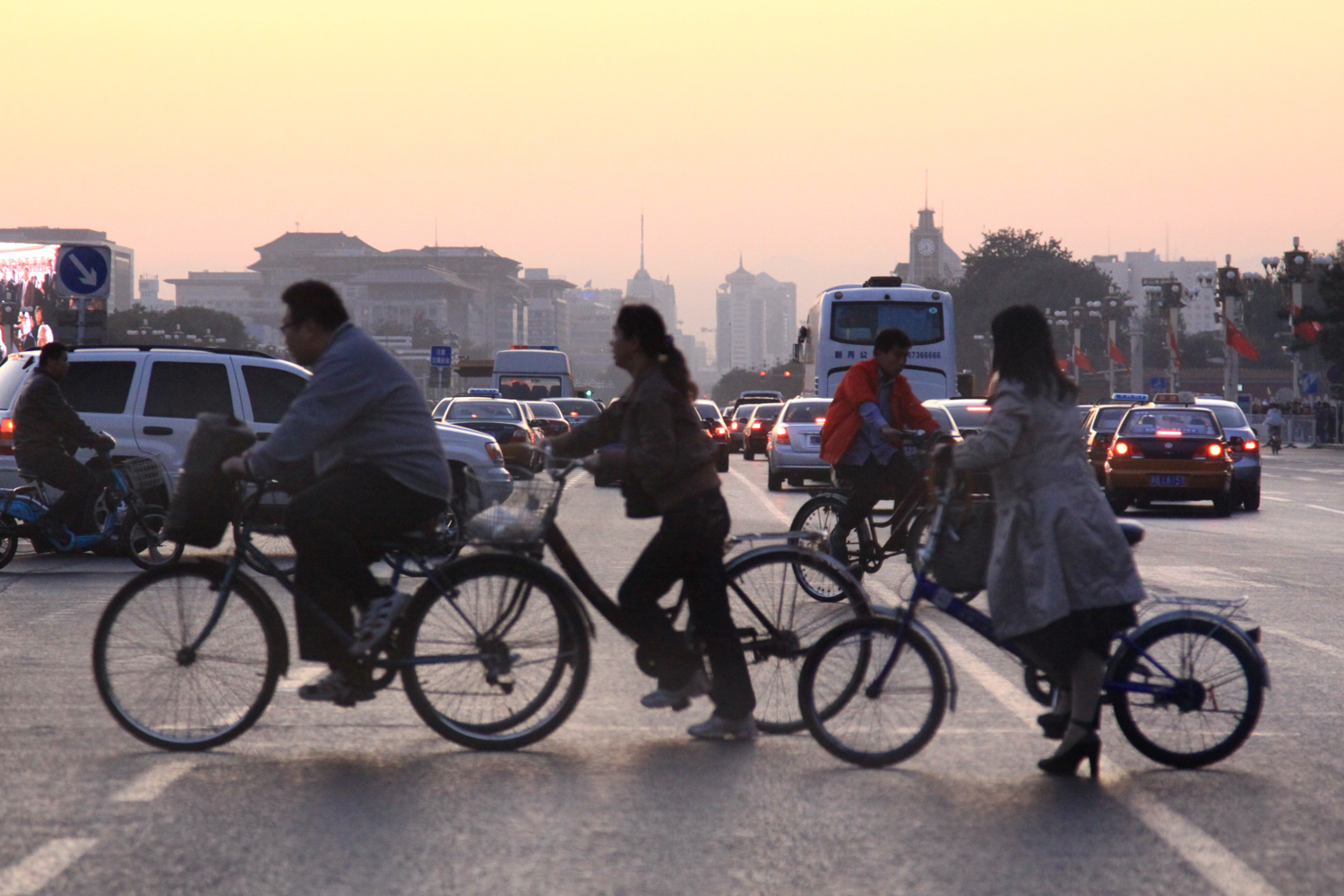 Beijing China